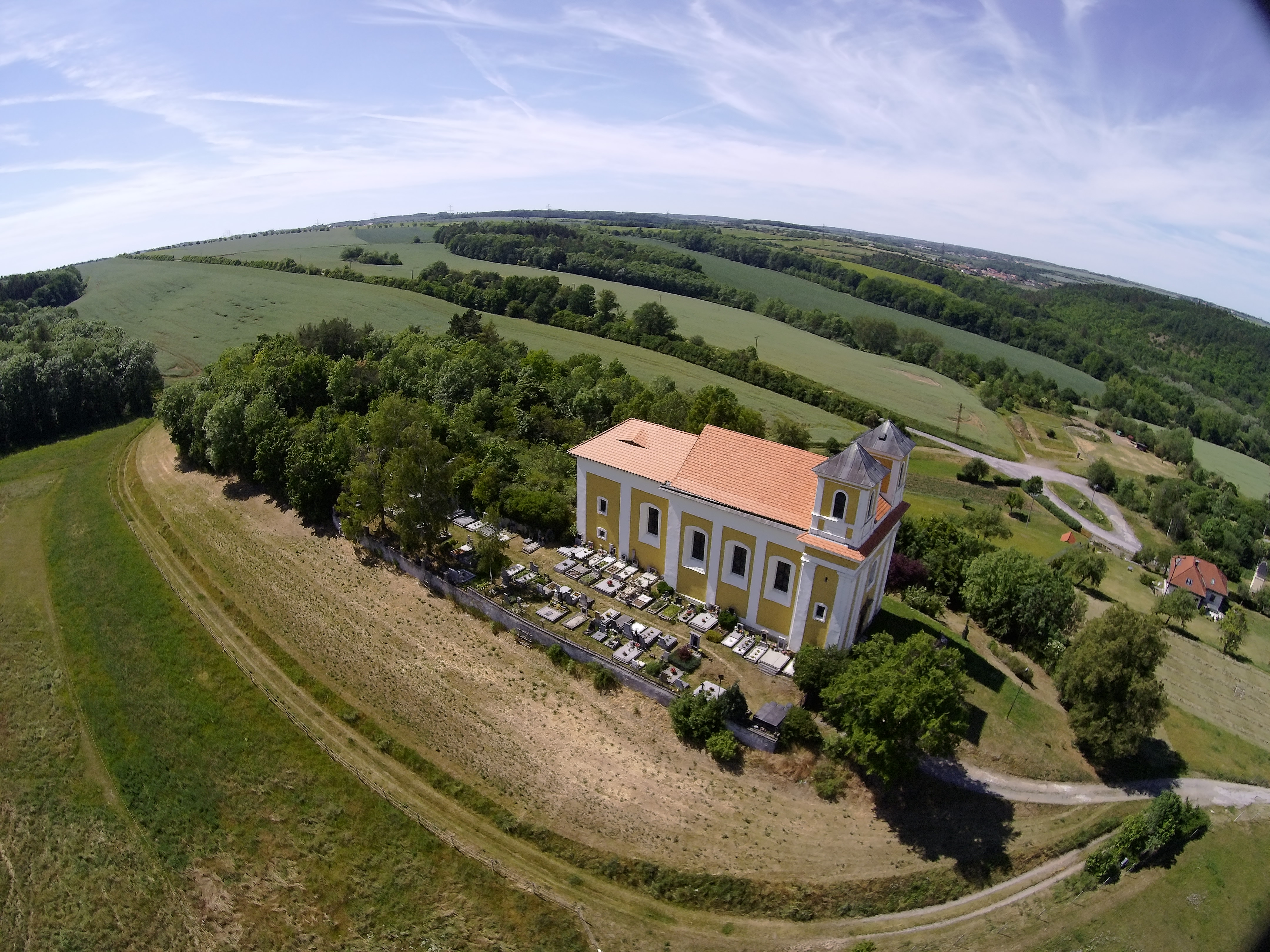 Kostel svaté Kateřiny (pohled z jihu)